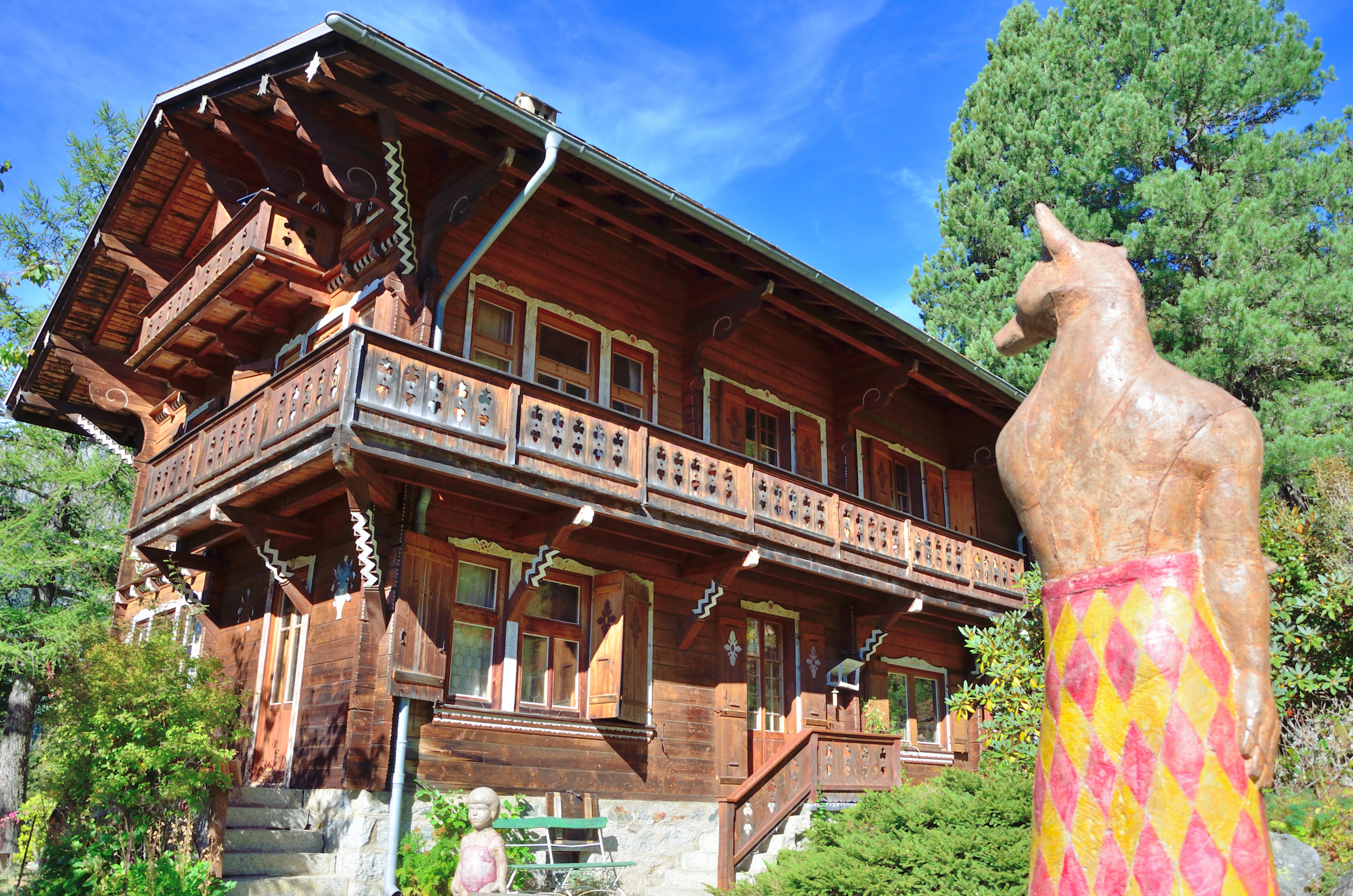 Jardin botanique alpin Flore-Alpe à 1520 m (Champex-Lac, Valais): sculpture de Nikola Zaric "Anubis passeur" et chalet historique de Jean-Marcel Aubert (façades sud et est).